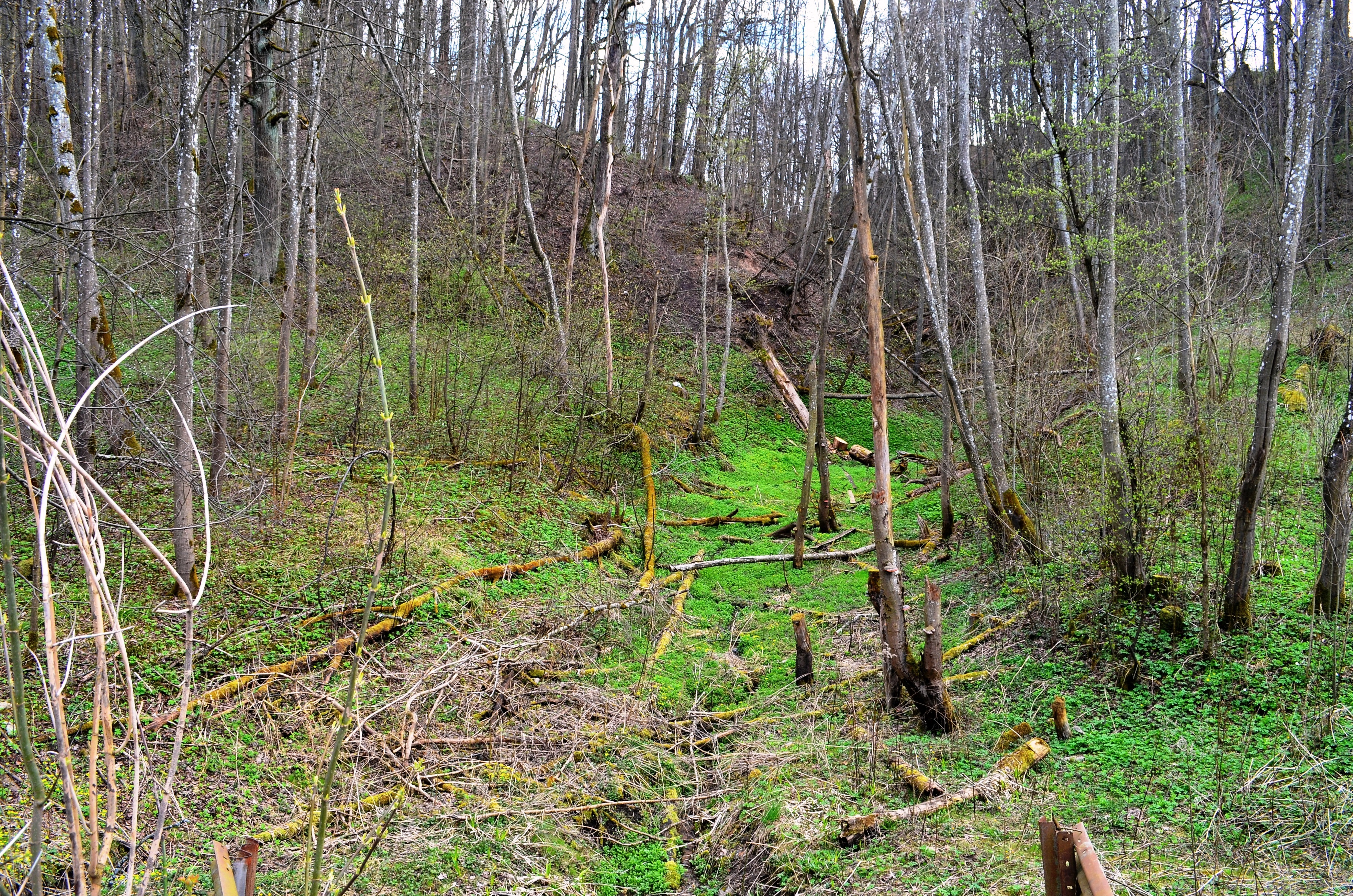 Griova prie Pavilnio g., Markučiai, Vilnius